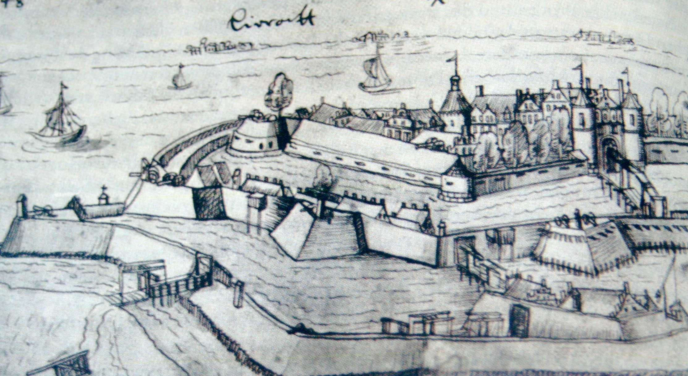 Die Festung in Leerort nach einer zeitgenössischen Darstellung aus dem Jahr 1632